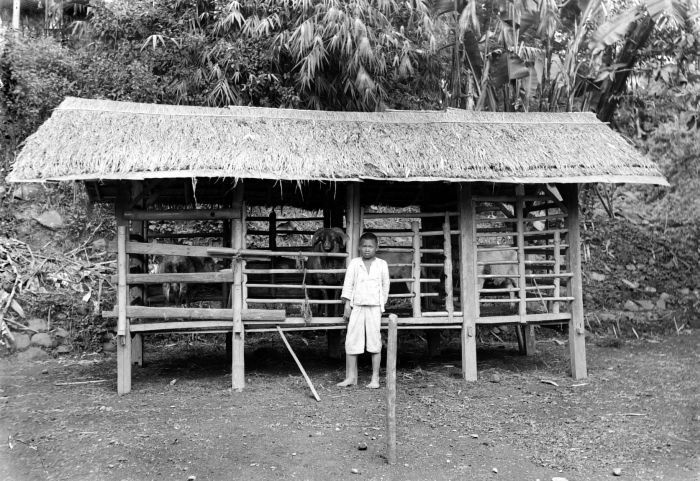 Negatif. Kandang kambing didirikan di depan tempat pengolahan pupuk kandang di suatu halaman rumah di Sindanglaya